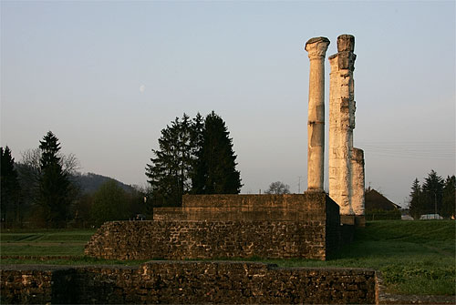 Avenches: Sanctuaire du Cignognier im Morgenlicht